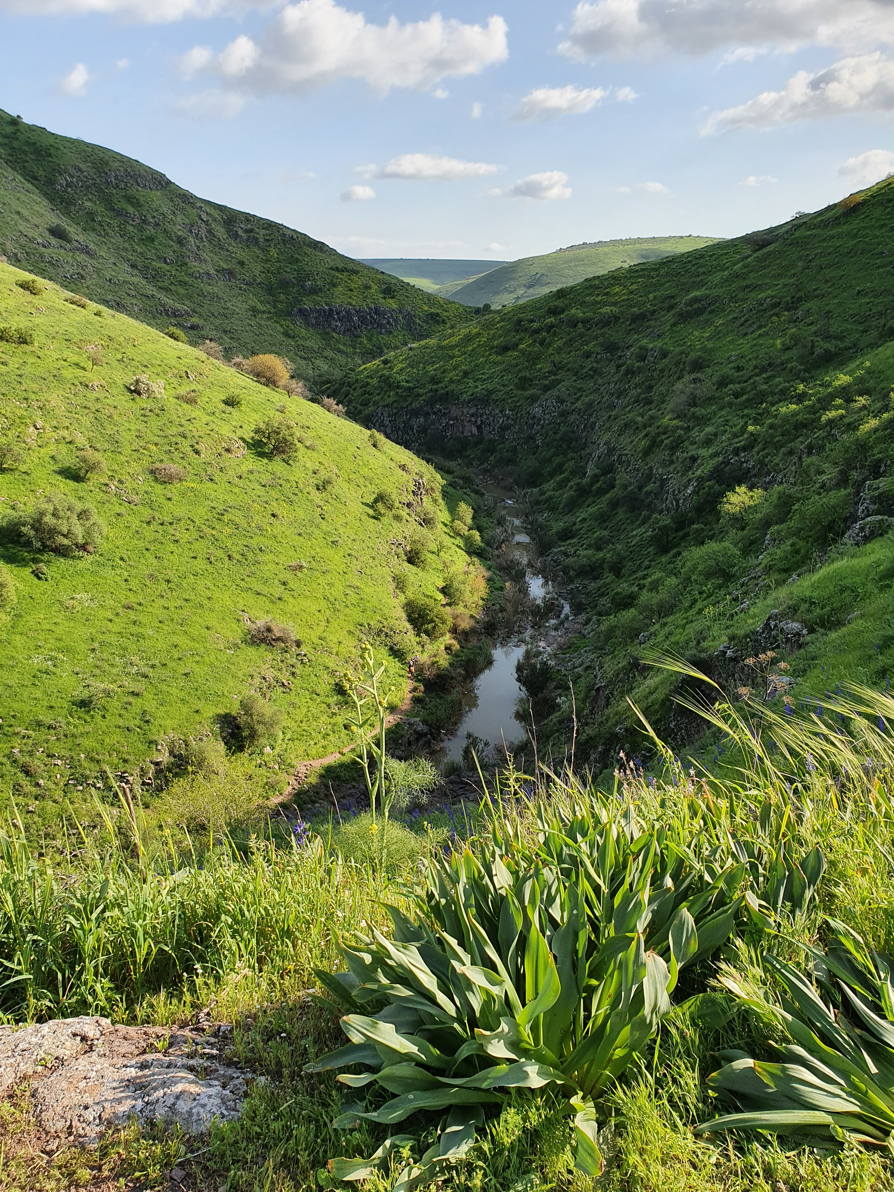 תמונה